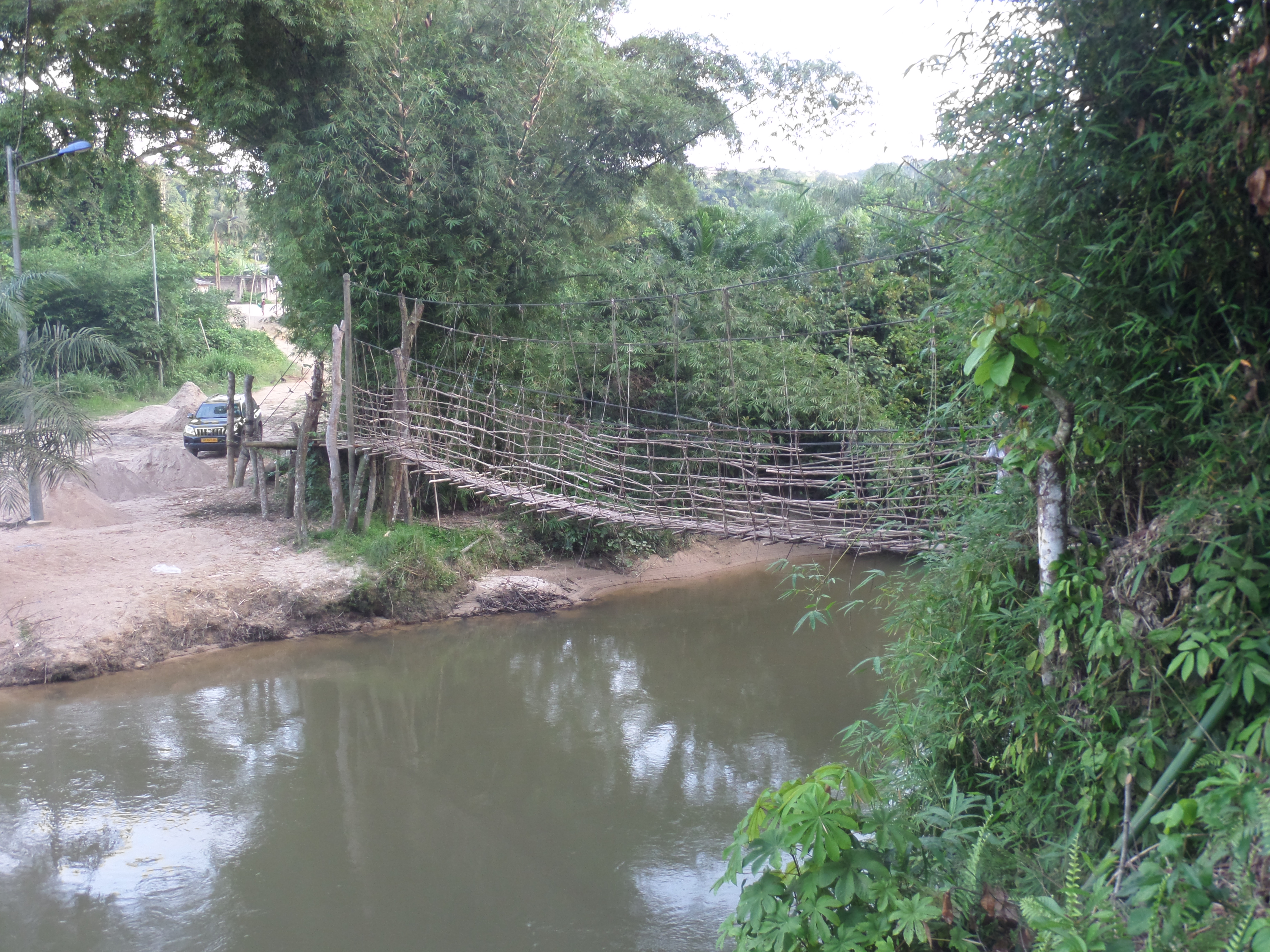 Pont en lianes sur l'Ogoulou. Pont Poungui-Mandji